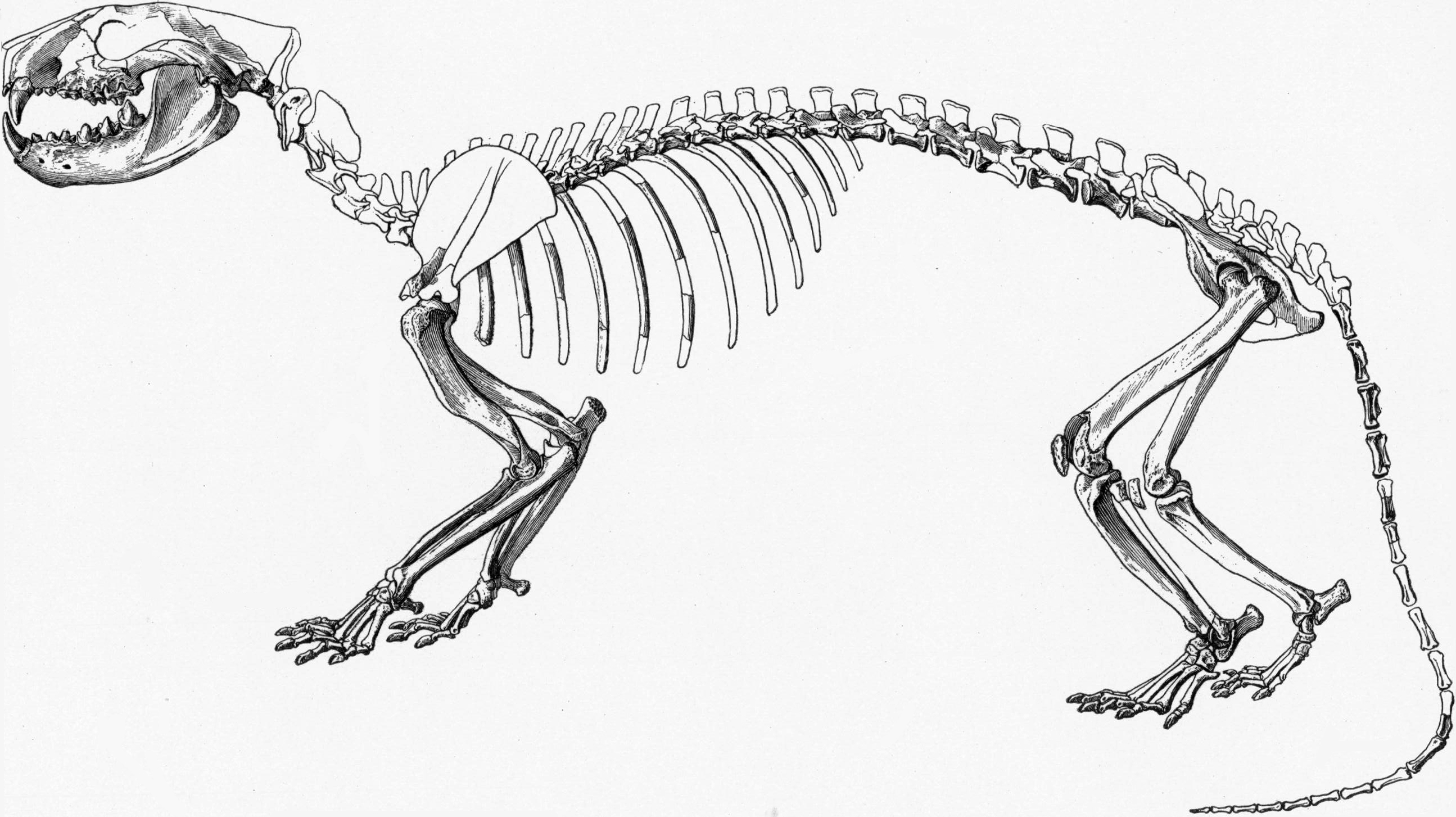 Oxyaena lupina skeletal restoration